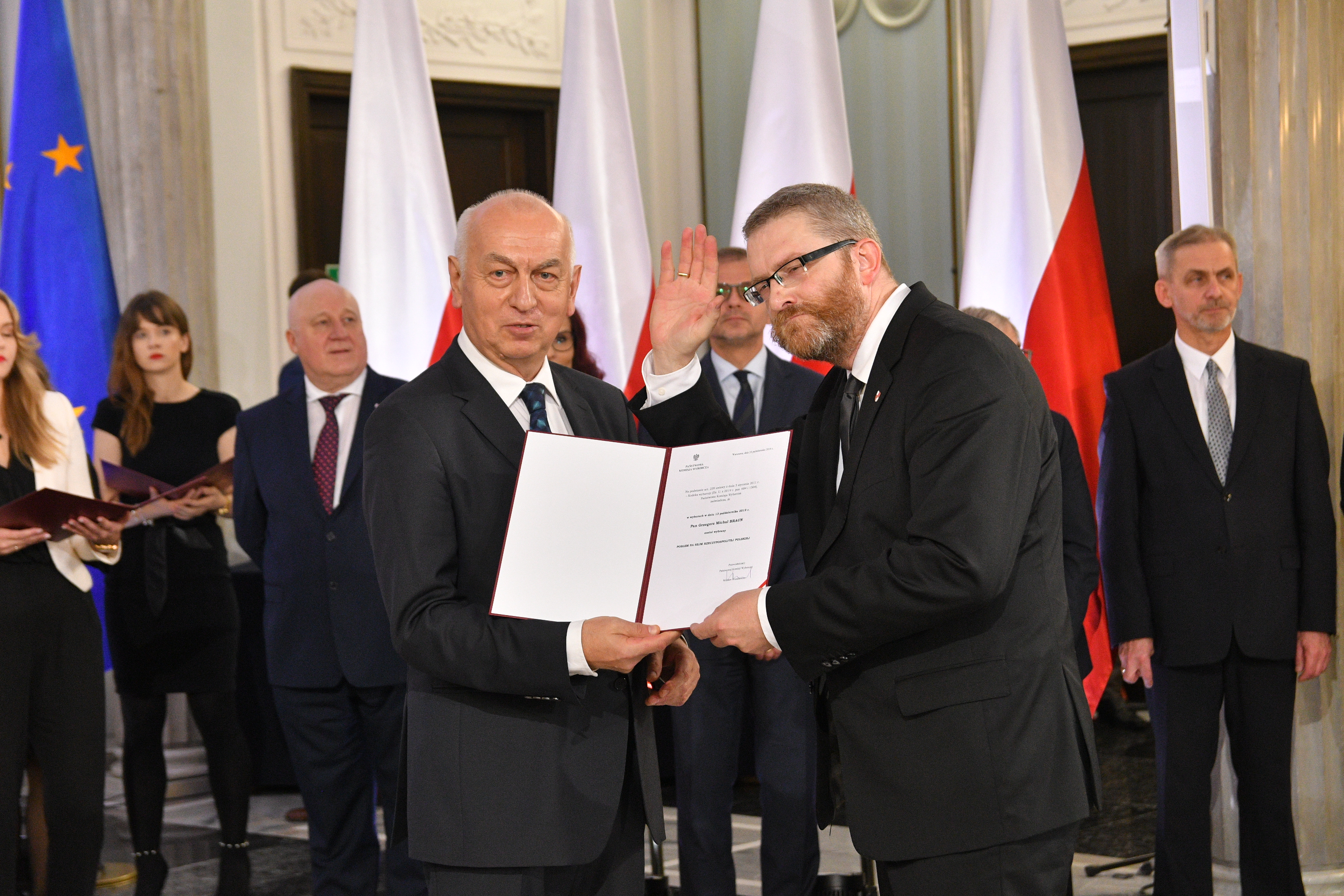 Poseł na Sejm IX kadencji Grzegorz Braun podczas wręczenia zaświadczenia o wyborze